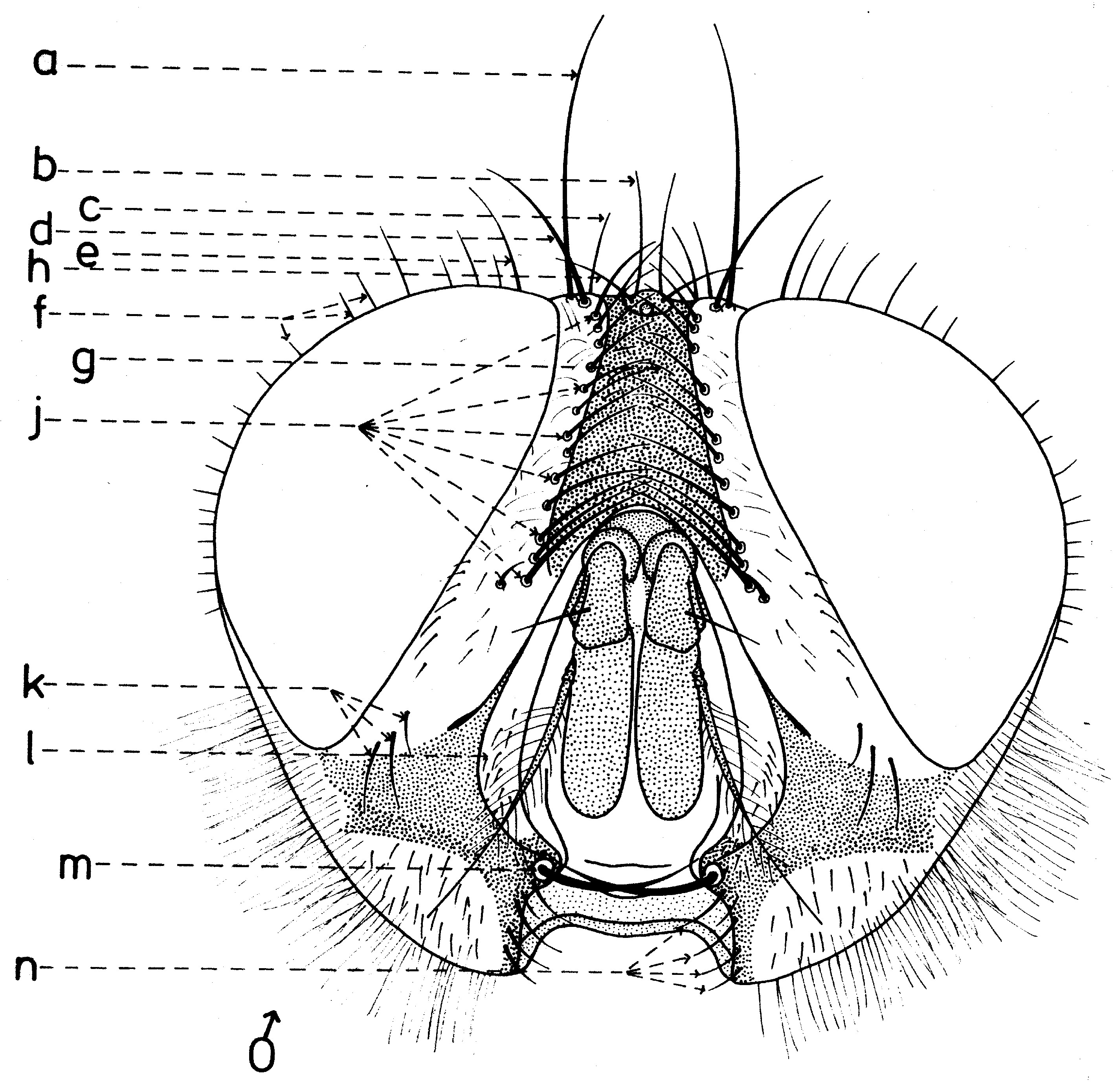 Chétotaxie de la tete du male.